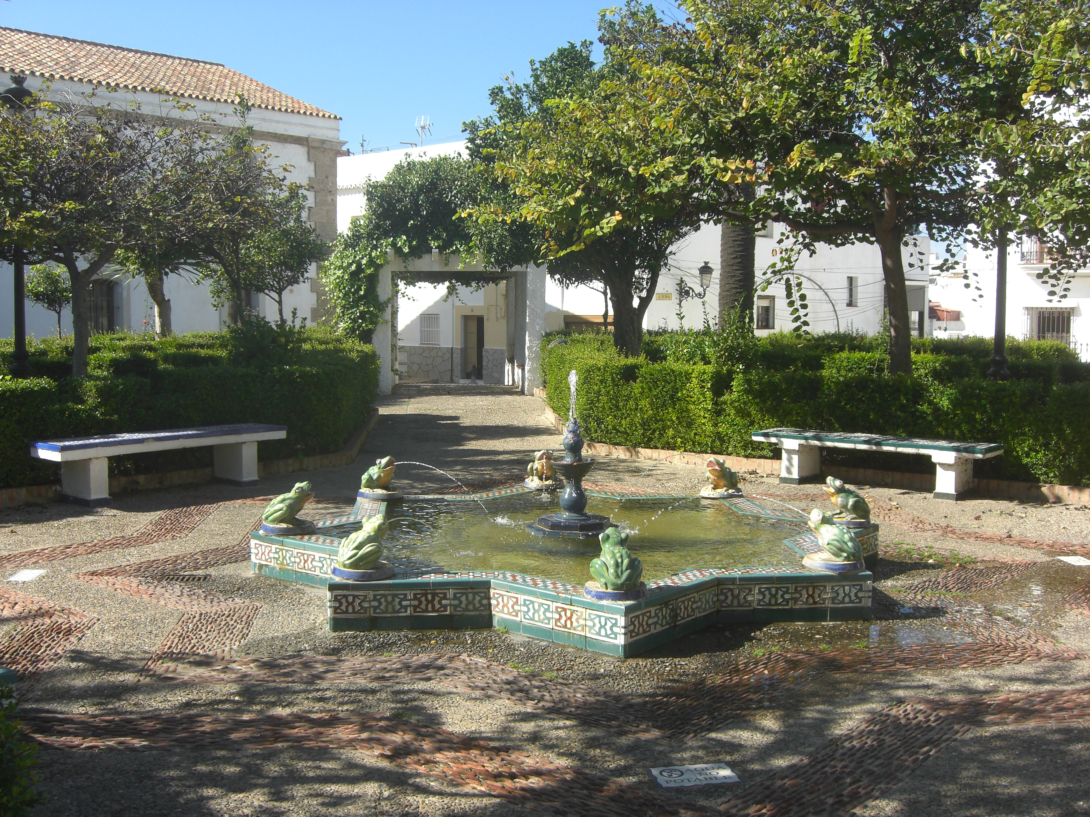 Fuente en la plaza de Santa María (Tarifa)